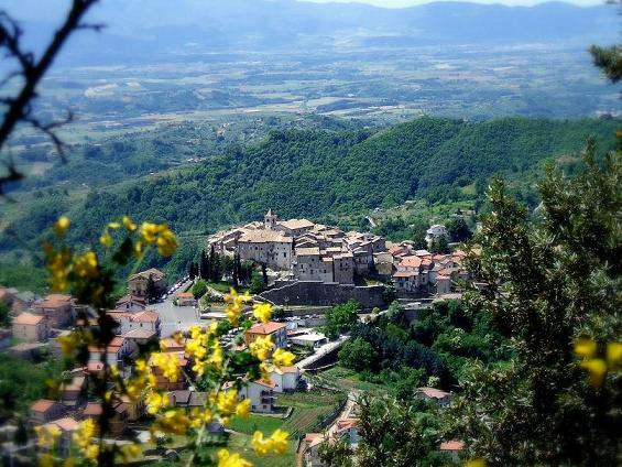 Roiate (Roma) fotografato da Santa Maria la Serra